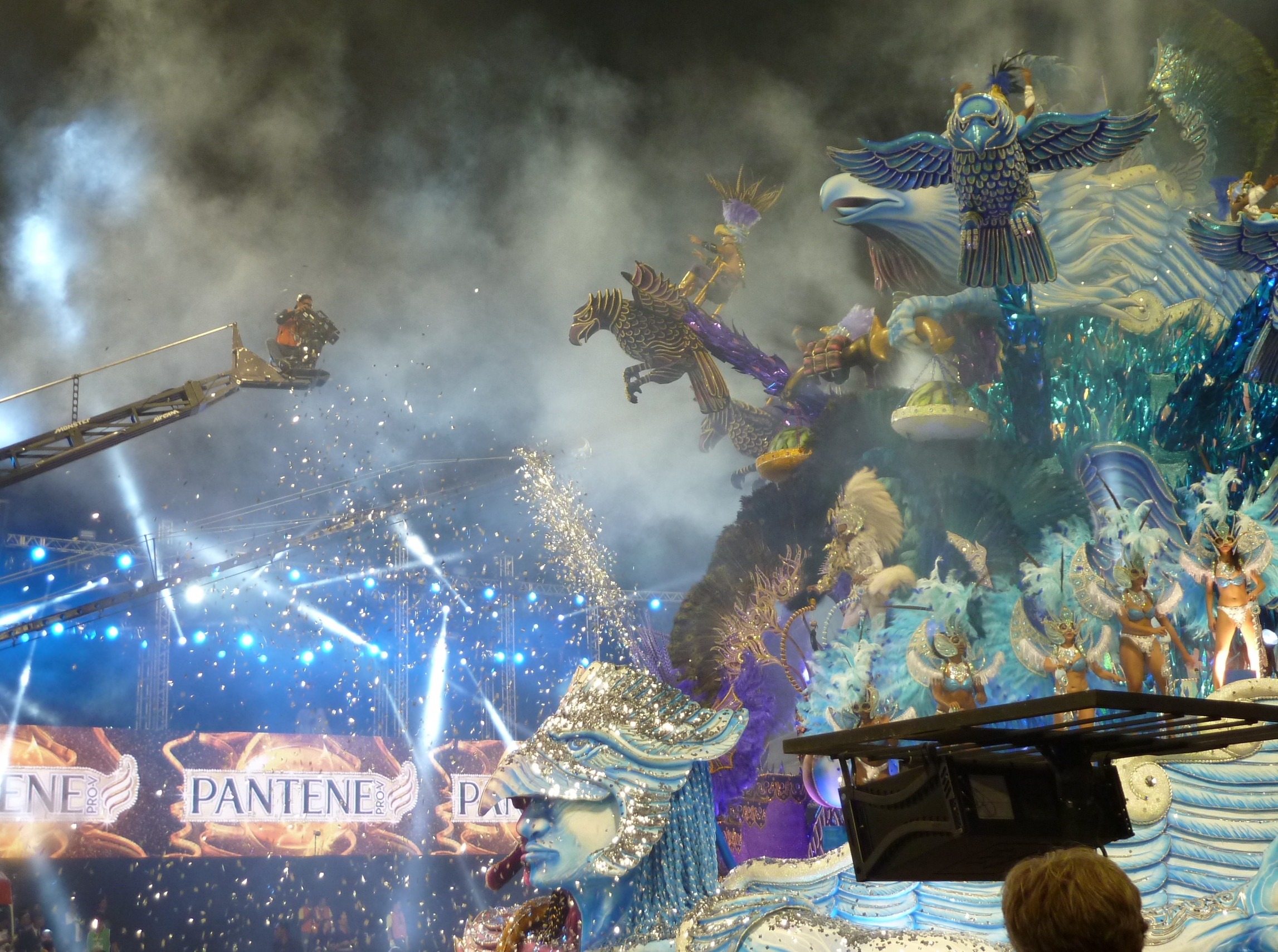 Carro abre-alas da escola de samba Nenê de Vila Matilde no Carnaval de São Paulo, Brasil, em 2013.